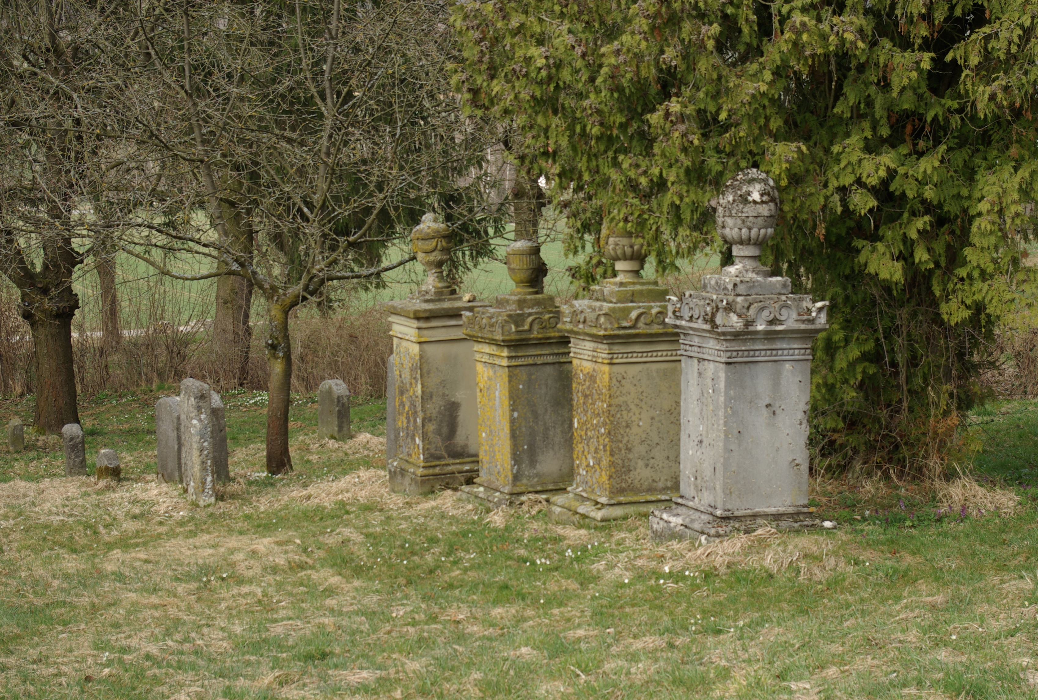 Gräber der Familie Wassermann auf dem Jüdischen Friedhof in Hagenbach (Pretzfeld)